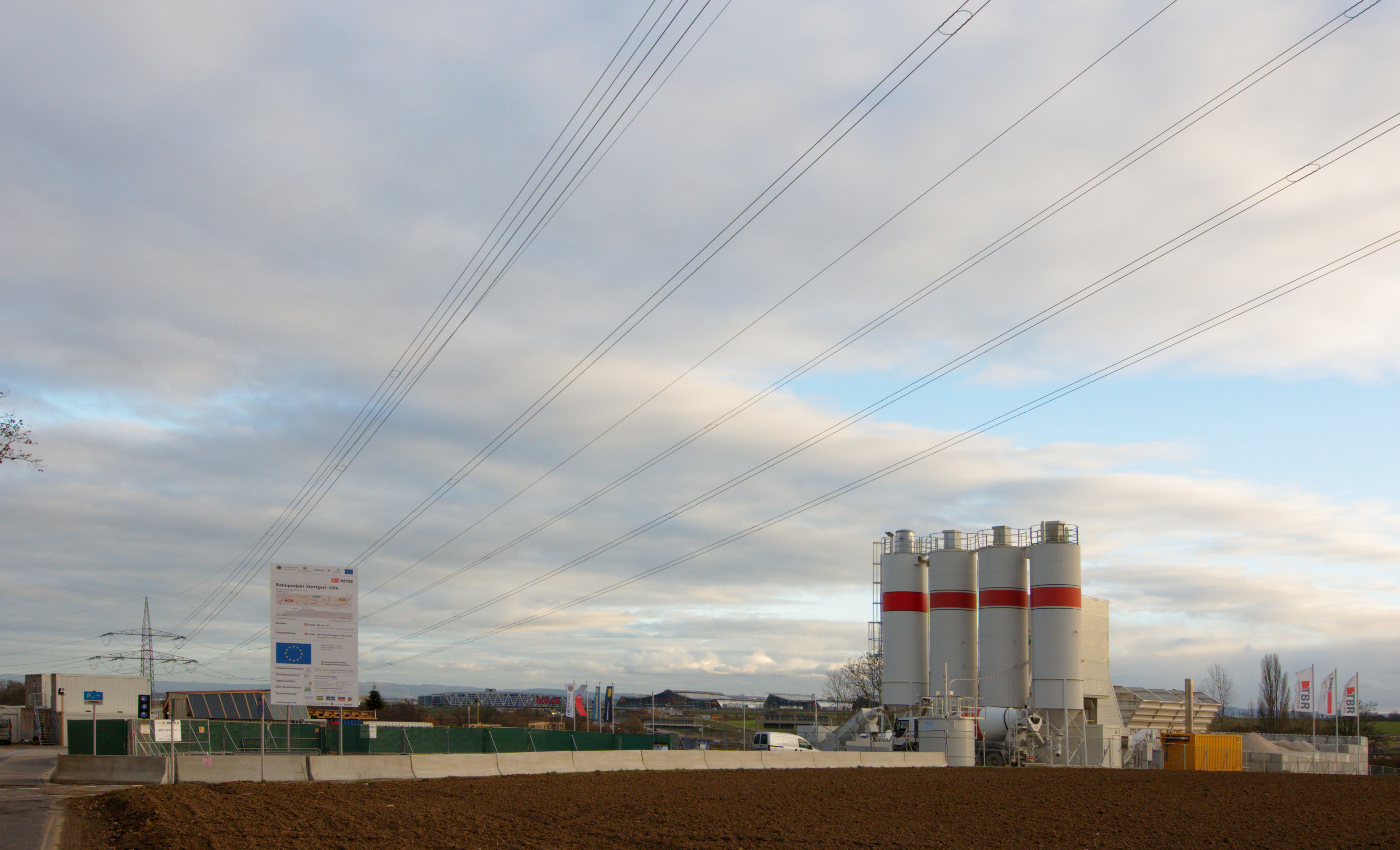 Baustelle am künftigen Südportal des Fildertunnels